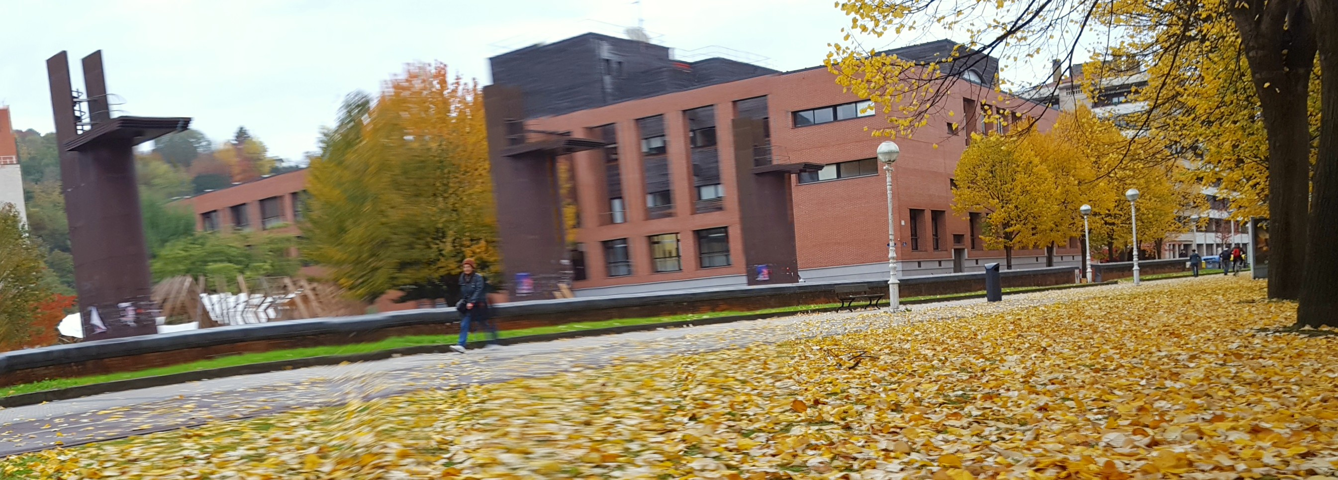 Donostiako Irakasle eskola HEFA fakultatekoa UPV/EHUn